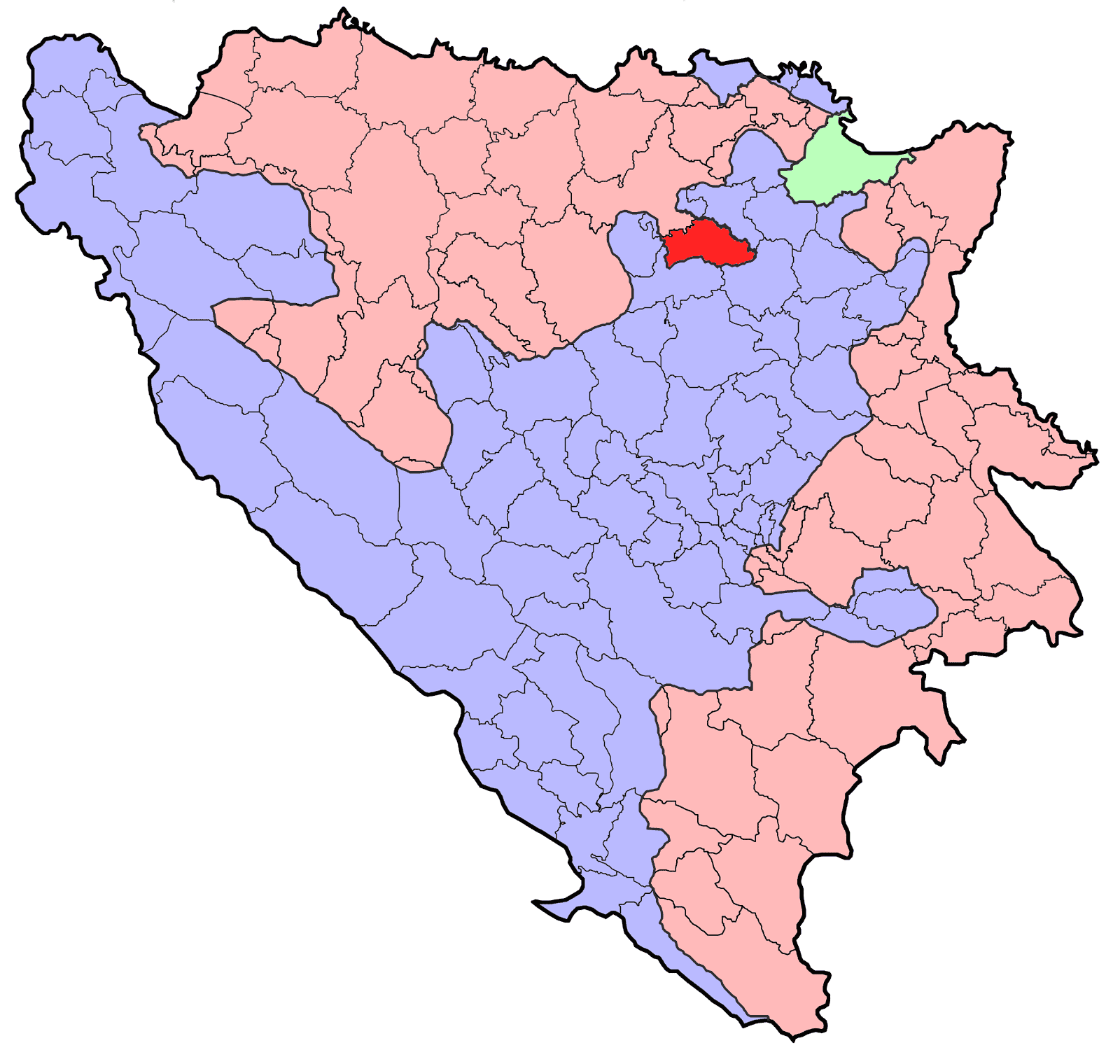 Republika Srpska (BiH) municipality